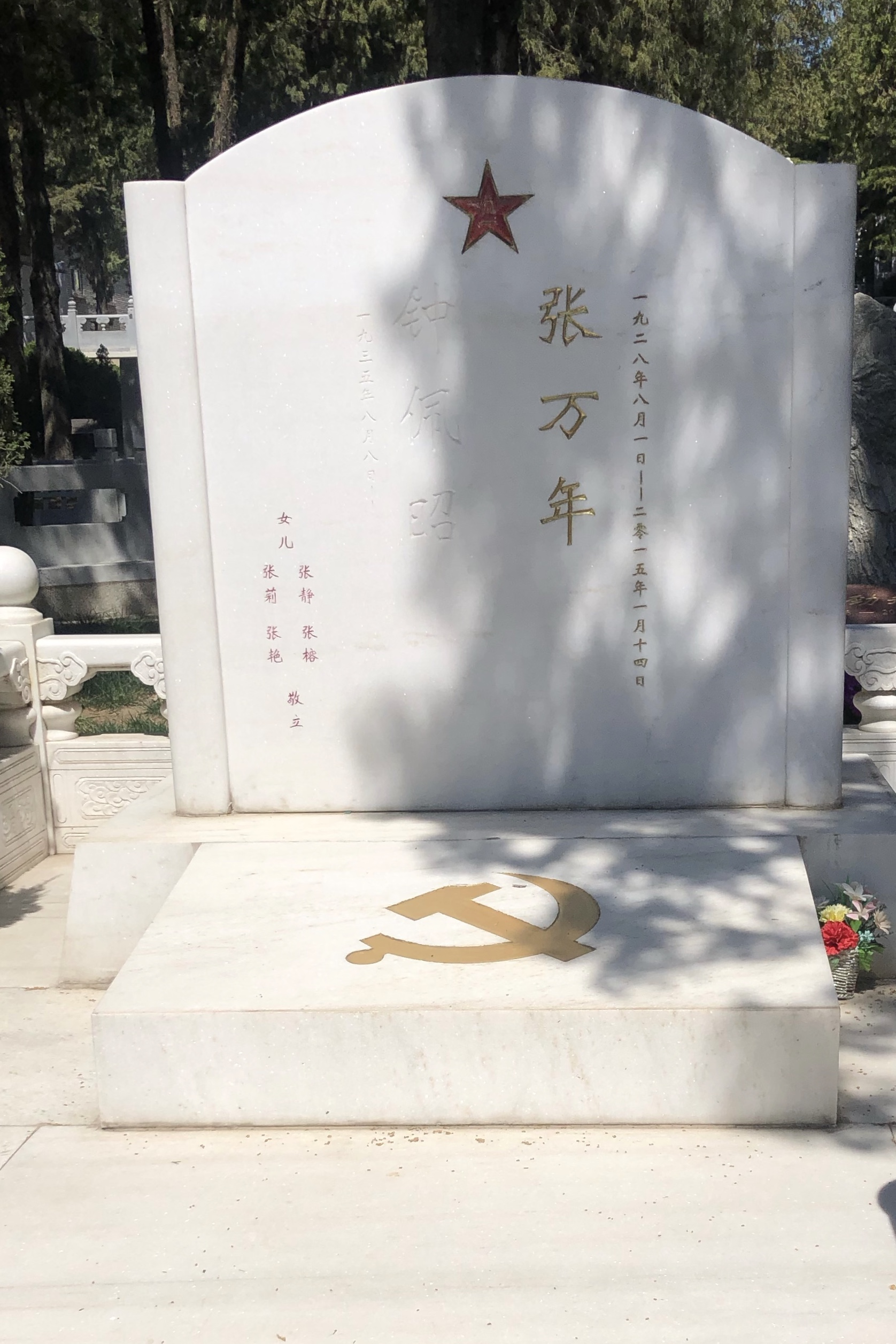 第8任中国人民解放军总参谋长张万年之墓。位于北京八宝山革命公墓内。